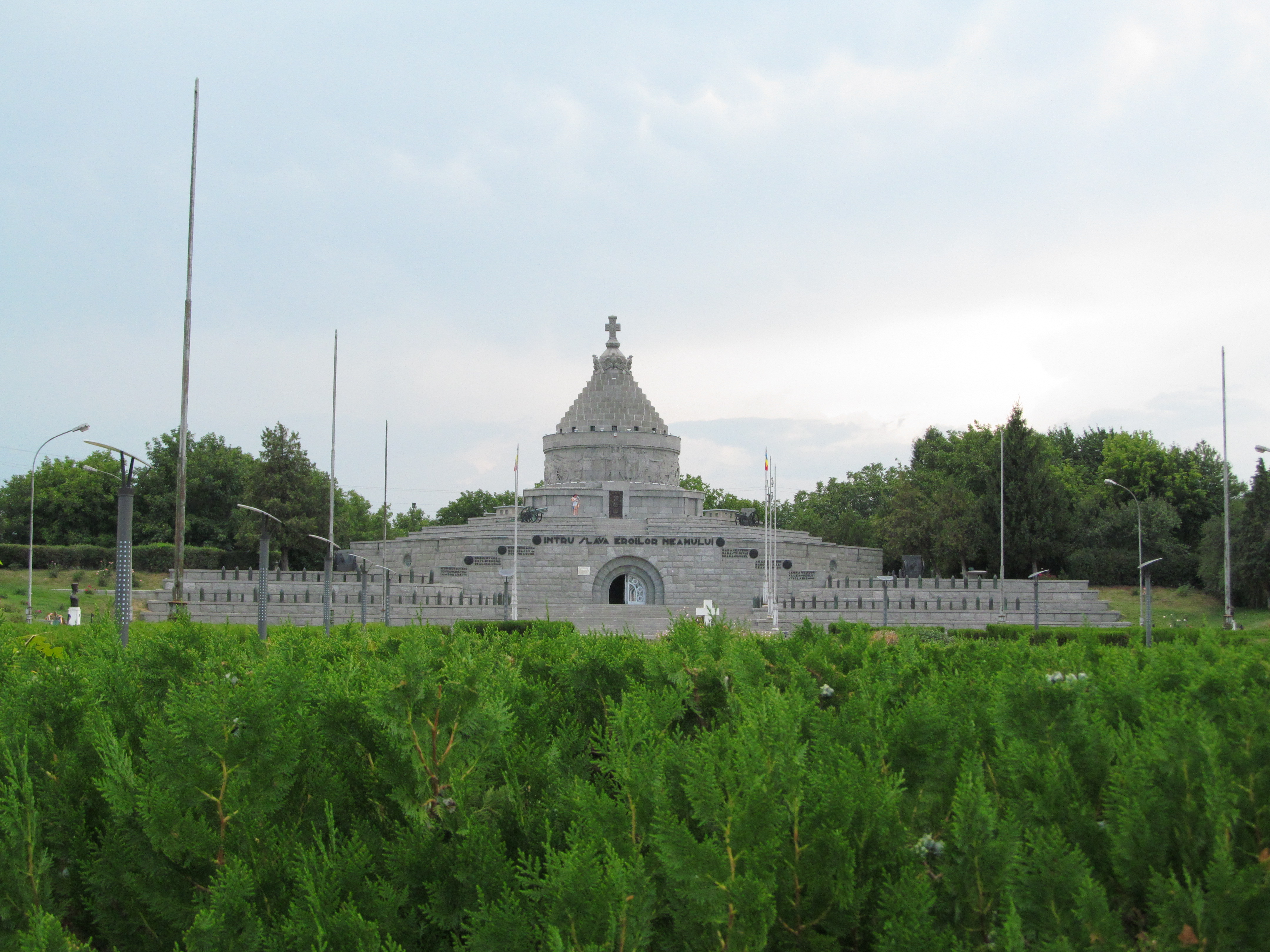 Mausoleul Eroilor (1916 - 1919)